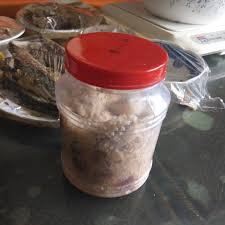 圖片為泰雅族製作的醃肉，又稱為得麼面，泰雅語稱作tmmyan，主要以鹽巴及豬肉所製成。